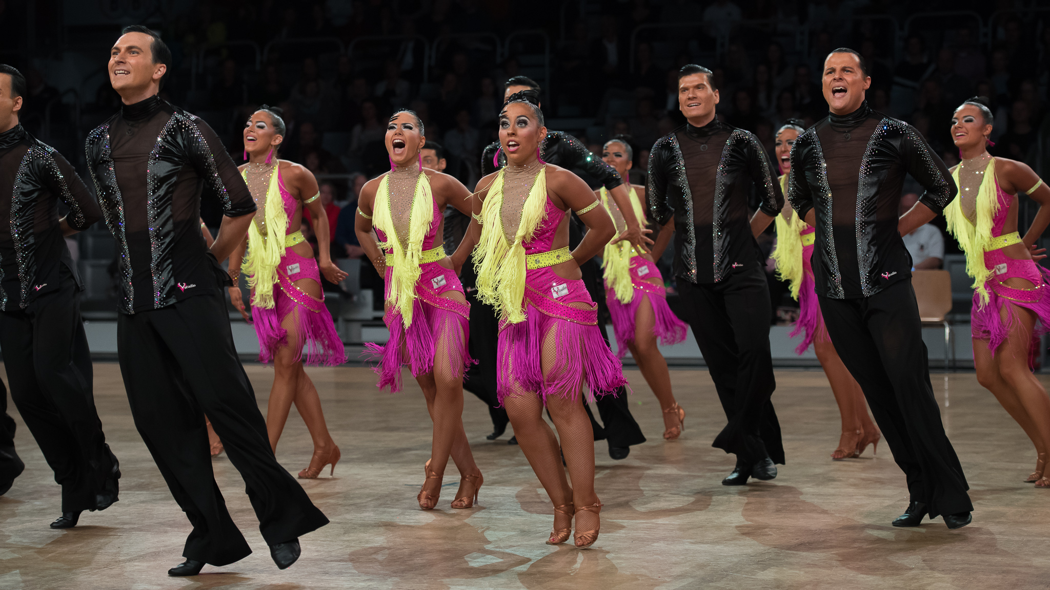 Bittersweet,Brose Arena Bamberg,Deutsche Meisterschaften der Formationen Standard & Latein 2016,Latein,TSG Backnang 1846 Tanzsport A,Tanzsport